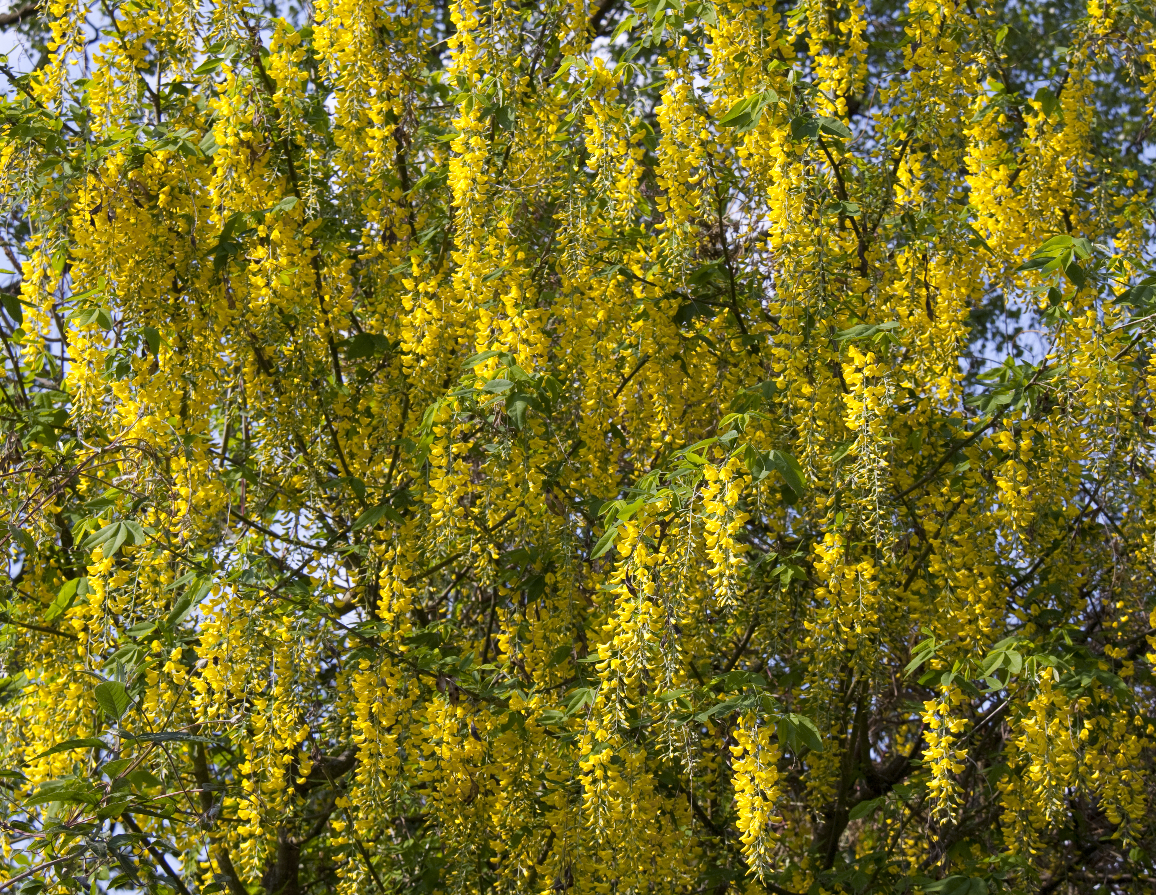 Laburnum × watereri